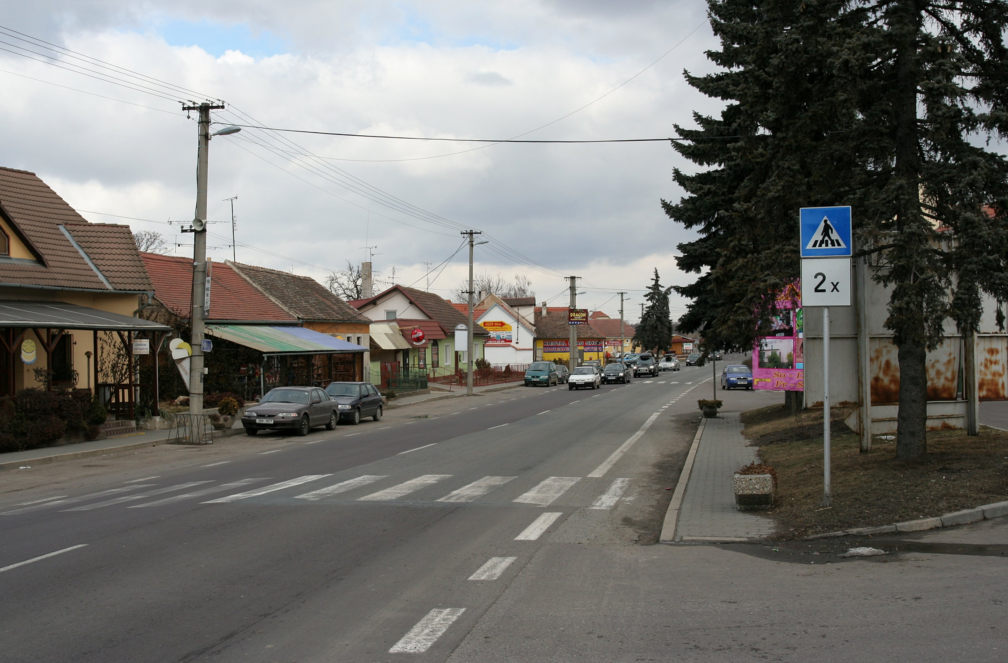 E59 ve Chvalovicích (mezi Znojmem a rakouskými hranicemi)